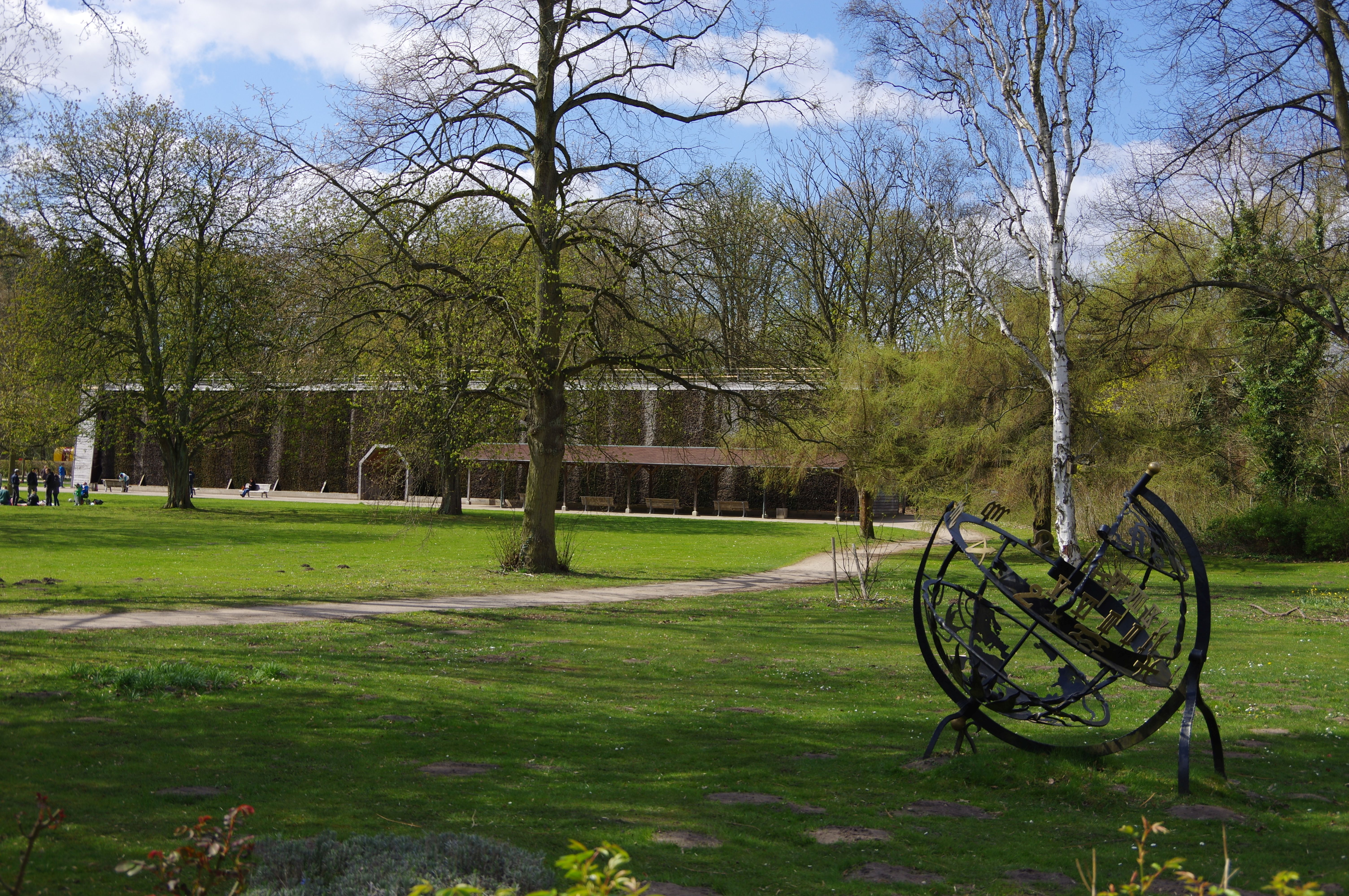 Kurpark Lüneburg in Niedersachsen. Das Gradierwerk steht unter Denkmalschutz.